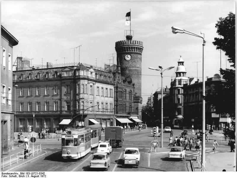 Cottbus, Altstadt, Spremberger Turm ADN-ZB Deutsche Demokratische Republik 3.8.1972 cu Cottbus: Die Altstadt mit dem Spremberger Turm verkörpert ein Stück Geschichte der Bezirksstadt an der Spree, Cottbus, im 12. Jahrhundert zum erstenmal urkundlich erwähnt, bildet heute das Zentrum des Industrie-Agrarbezirkes im Osten der DDR und hat unter anderem Tuch-, Bekleidungs-, Nahrungsmittel- und Elektroindustrie. Reporter: Schutt Copyright: ADN-Zentralbild